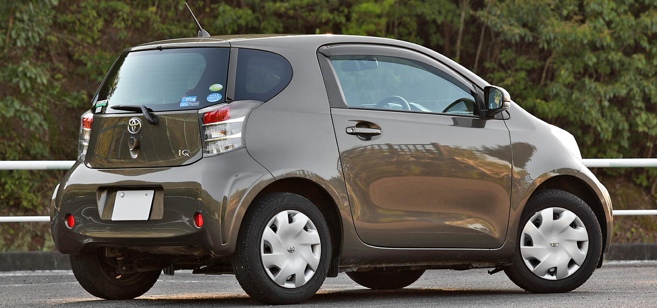 Toyota iQ.